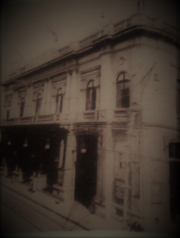 recorte periodístico referente al Teatro de la Victoria de Buenos Aires, Calle de la Victoria n° 954 (actual Hipólito Yrigoyen).